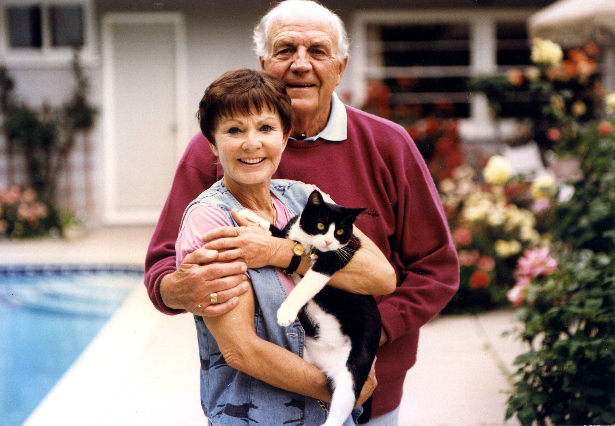 Ehepaar Erika Remberg & Sidney Hayers im Garten ihres Hause in Encino, CA